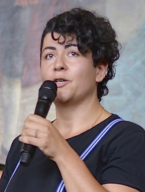 Farnaz Arbabi under Dramatens höstsamling 2014.